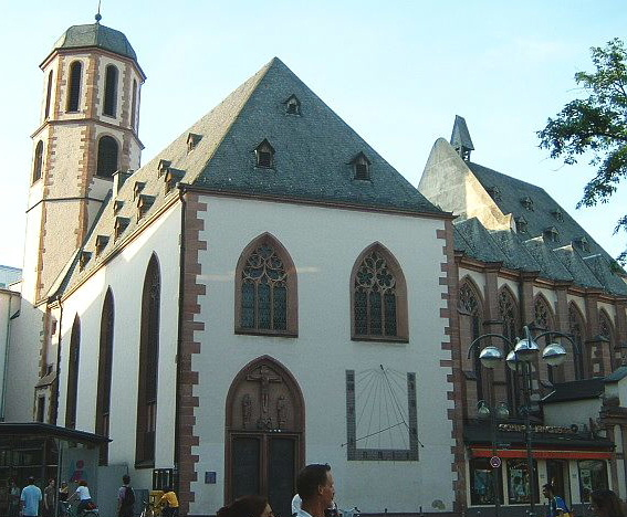 Liebfrauenkirche Frankfurt/Main auf dem Liebfrauenberg hinter der Zeil.